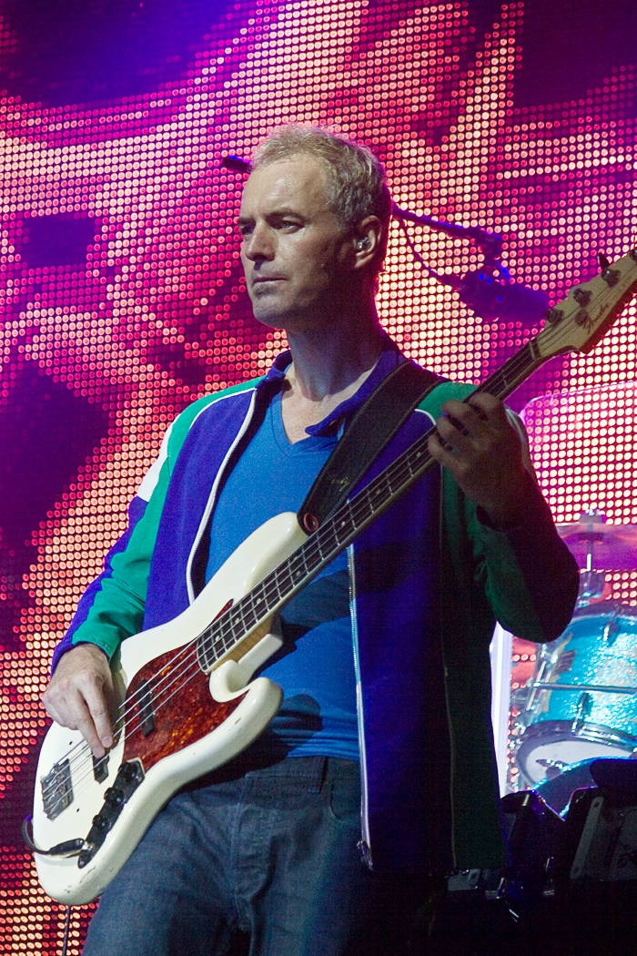 Concierto de Jamiroquai en el Poble Espanyol